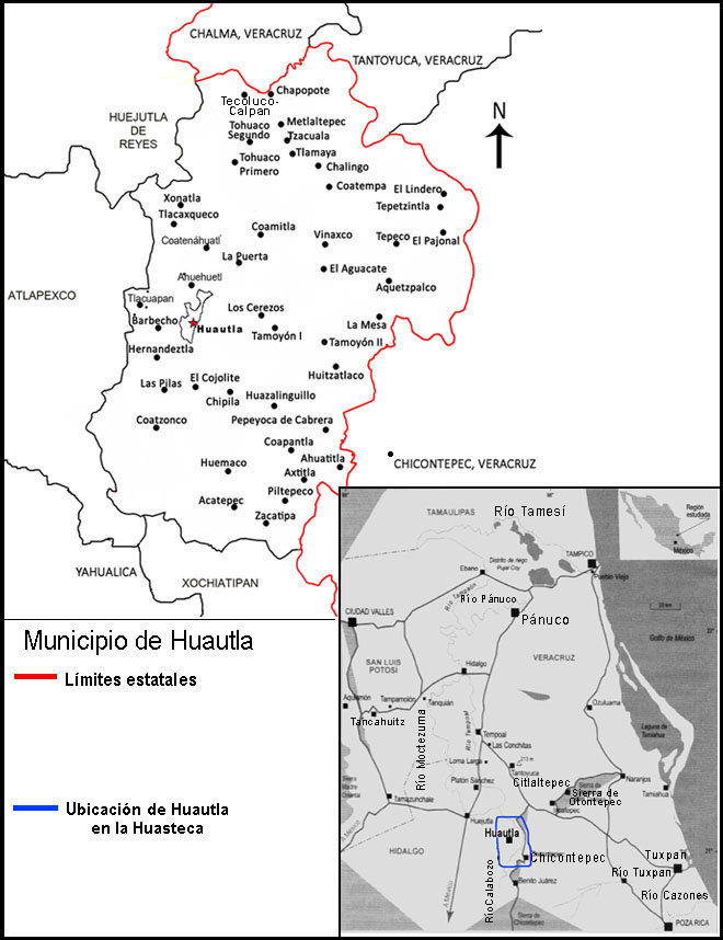 Mapa con la Ubicación de Huautla, Hidalgo.